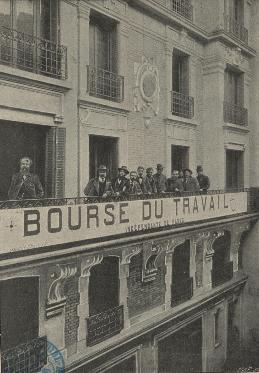 "Façade de la Bourse de Travail, rue des Vertus".